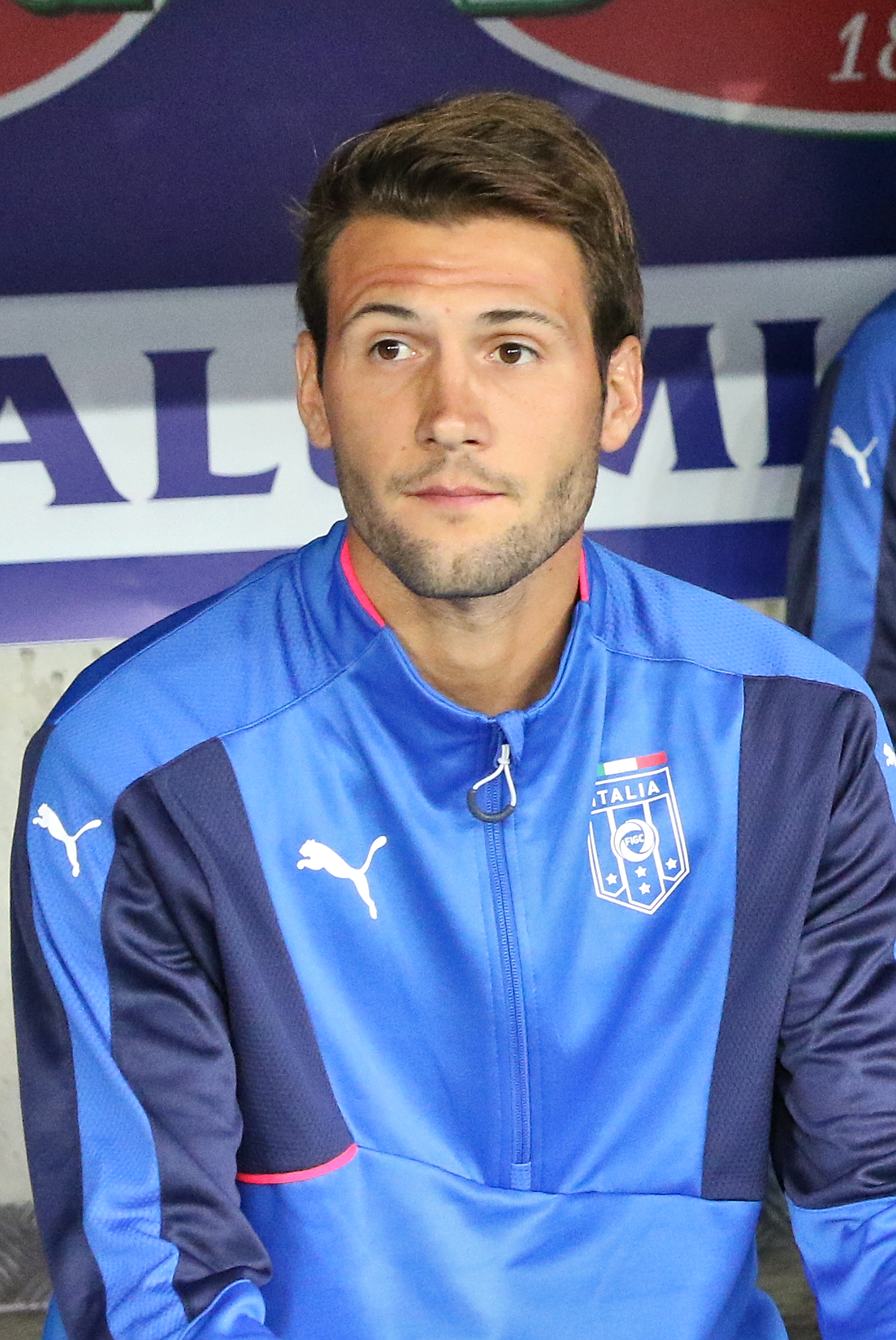 20150616 - Portugal - Italie - Genève - Franco Vazquez